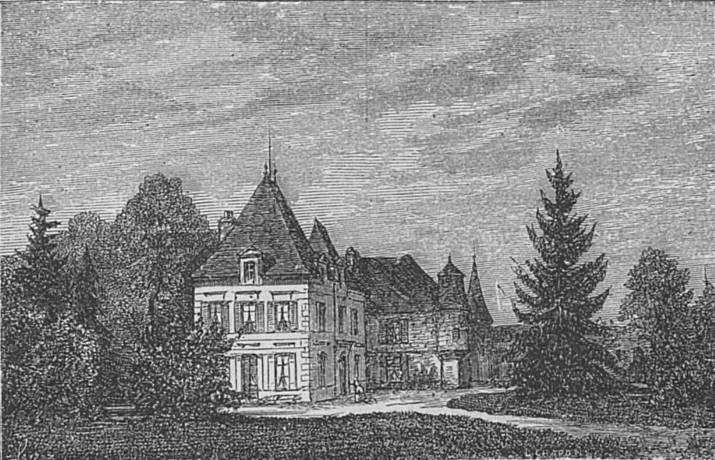 Illustration du Château Haut Brion dans l'ouvrage Bordeaux et ses vins (6ème édition) de Charles Cocks et Edouard Féret publié en 1893